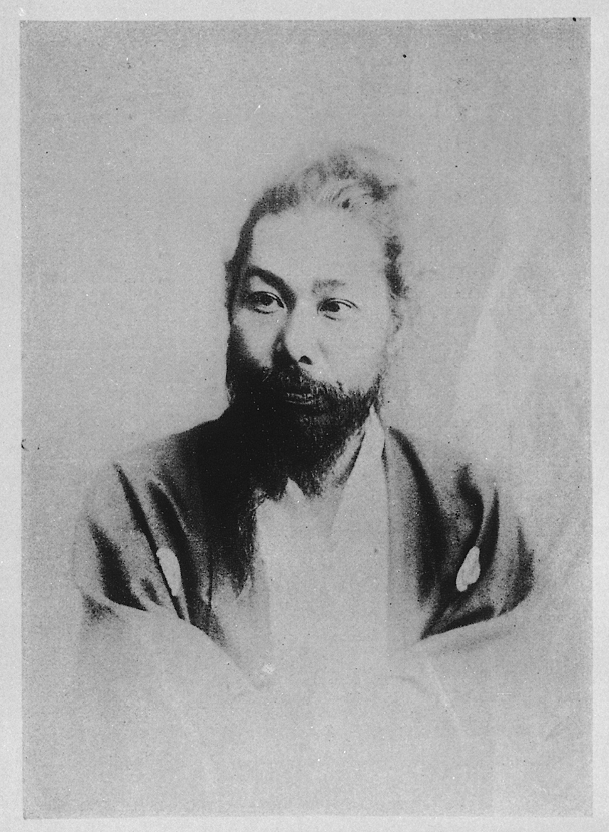 Portrait of Miyazaki Toten (宮崎滔天, 1871 – 1922)